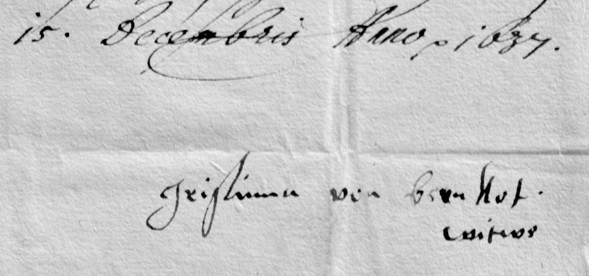 Unterschrift der Christine von Diez. Hessisches Hauptstaatsarchiv Wiesbaden. 171 B 508